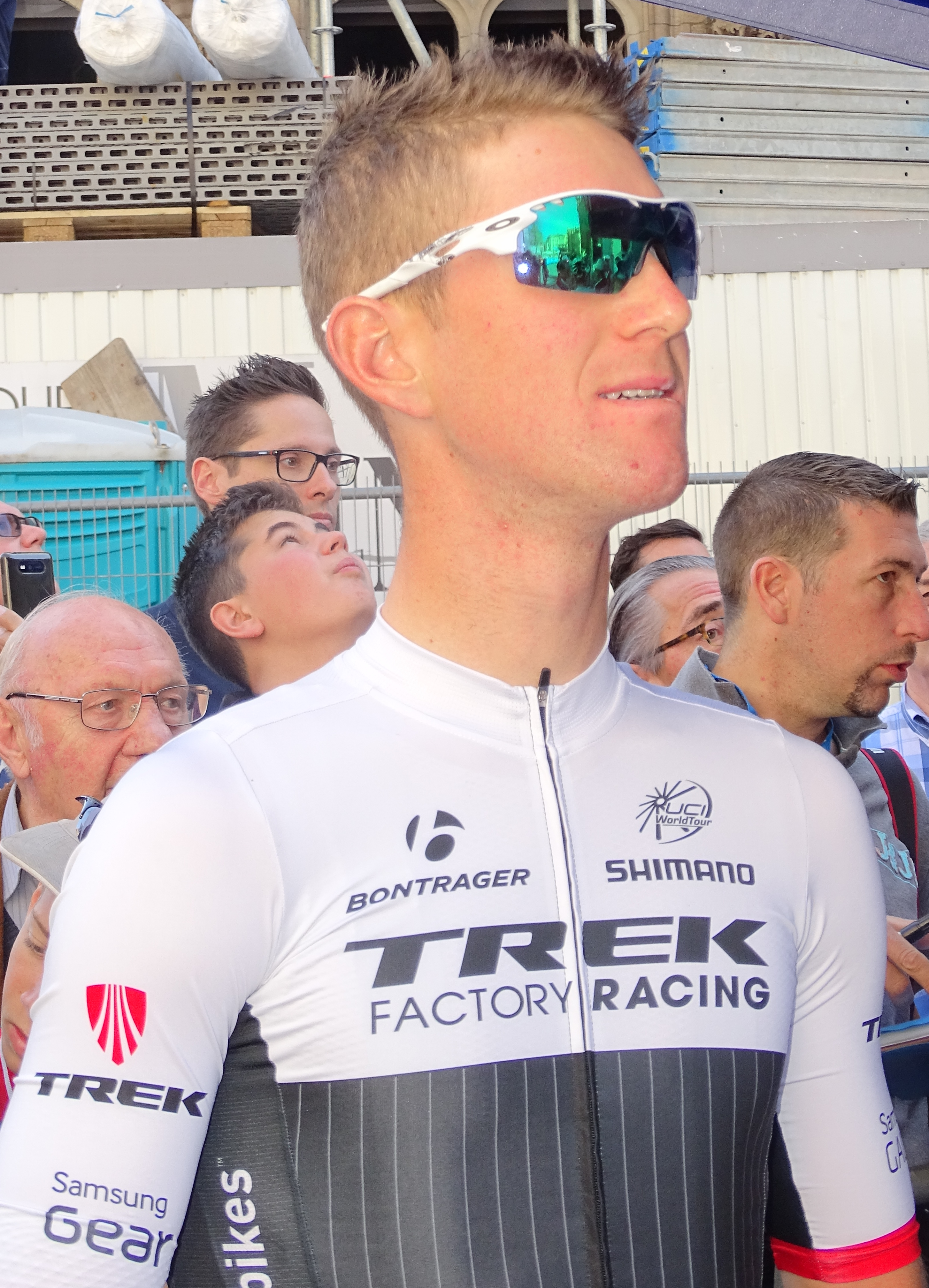 Reportage réalisé le mercredi 15 avril à l'occasion du départ de la Flèche brabançonne 2015 à Louvain, Belgique.